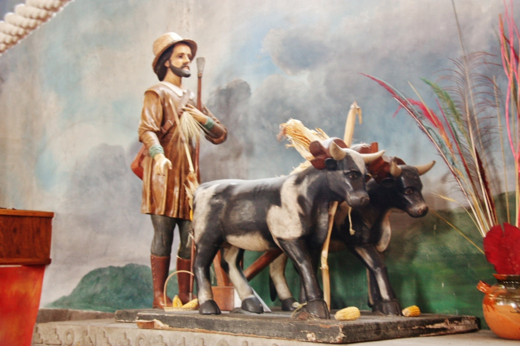 La Barca de la Fé, Templo Parroquial de San Andrés Buenavista, Tlaxco, Tlaxcala, México